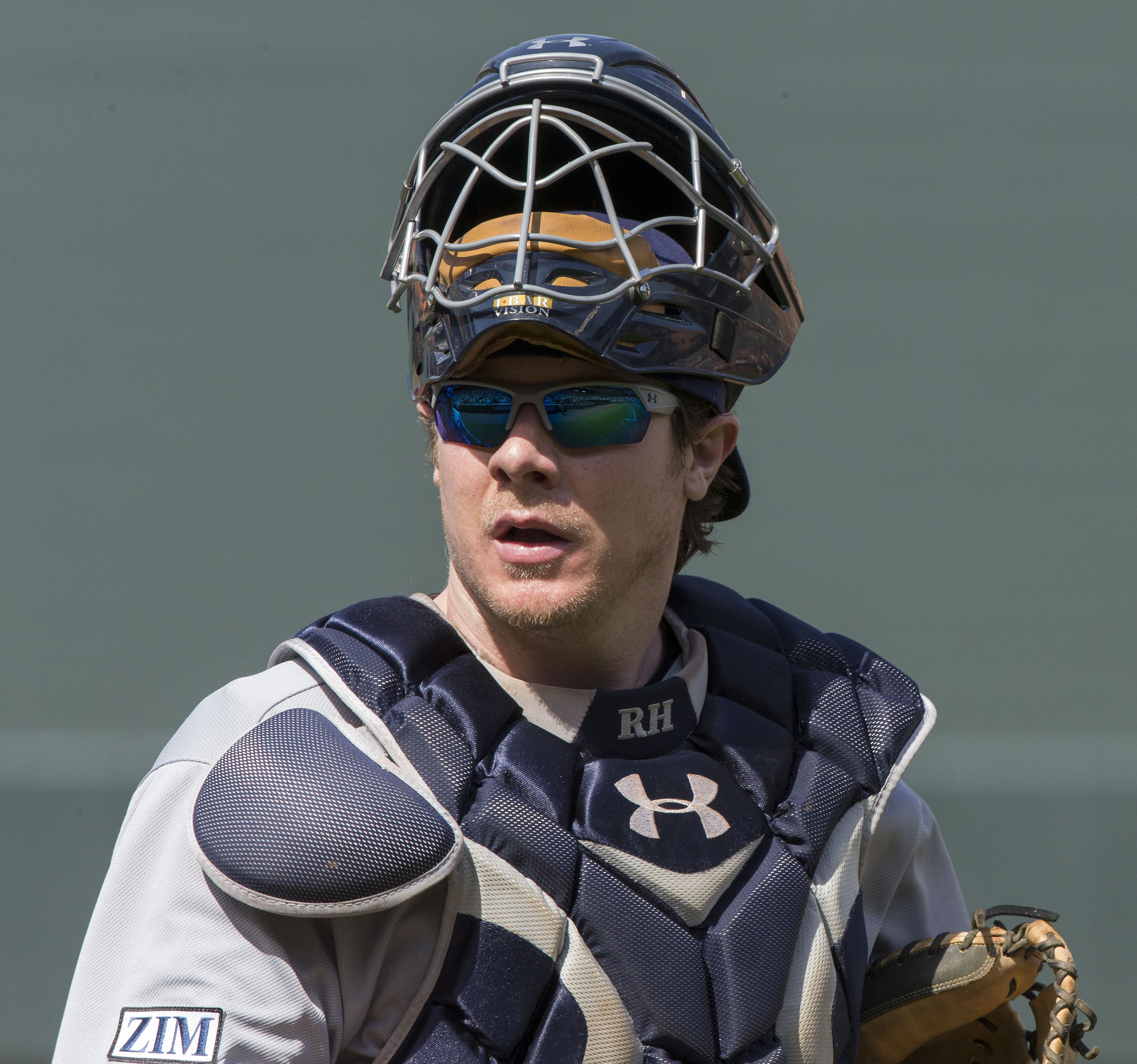 Ryan Hanigan